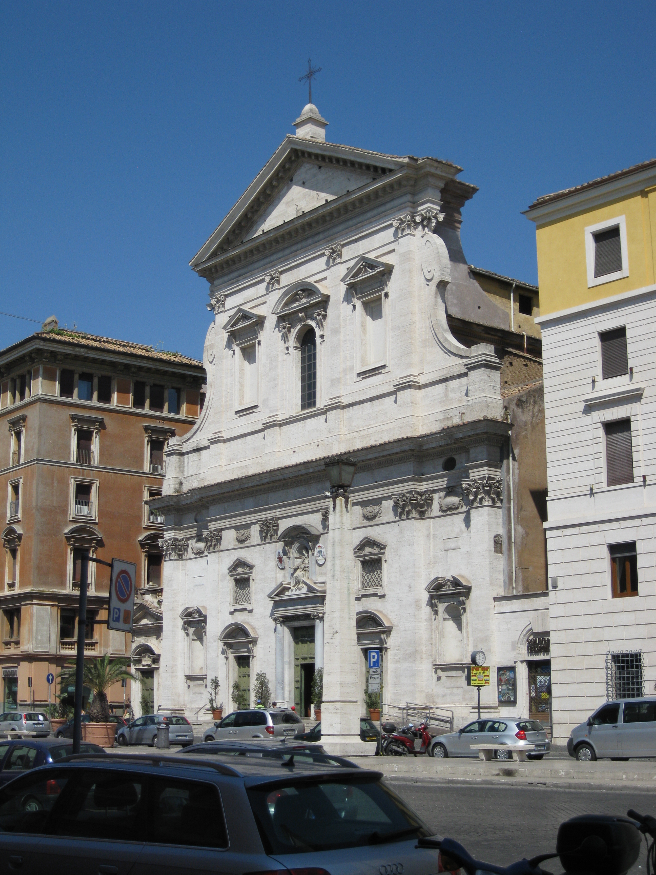 Chiesa di Santa Maria in Traspontina, nel rione Borgo.